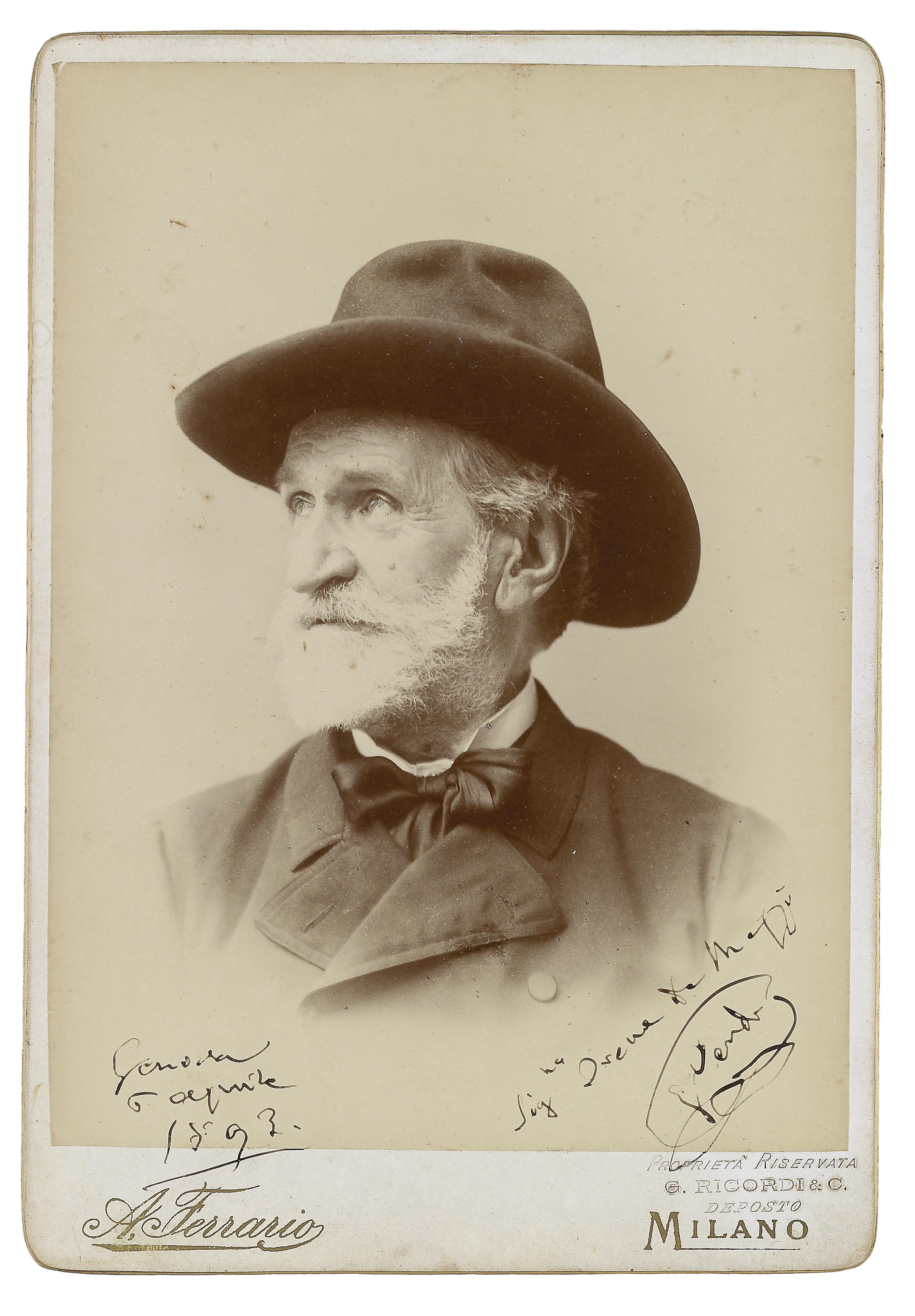 Giuseppe Verdi, Portraitphotographie mit eigenhändiger Widmung, Genua, 5. 4. 1893, 24 x 17 cm